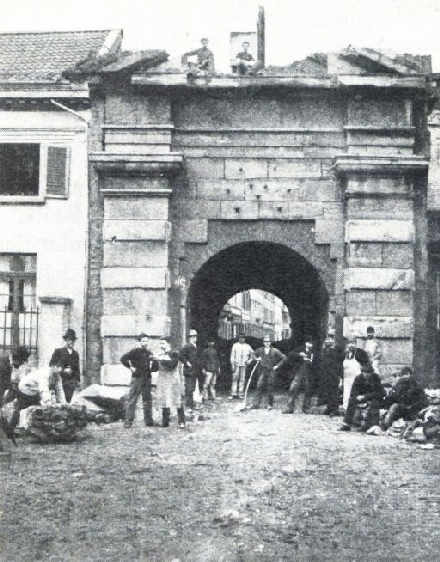 Berger Tor in Düsseldorf erbaut im Jahre 1620, Abbruch 1895.jpg